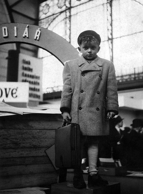 Dětství Milana Zeleného